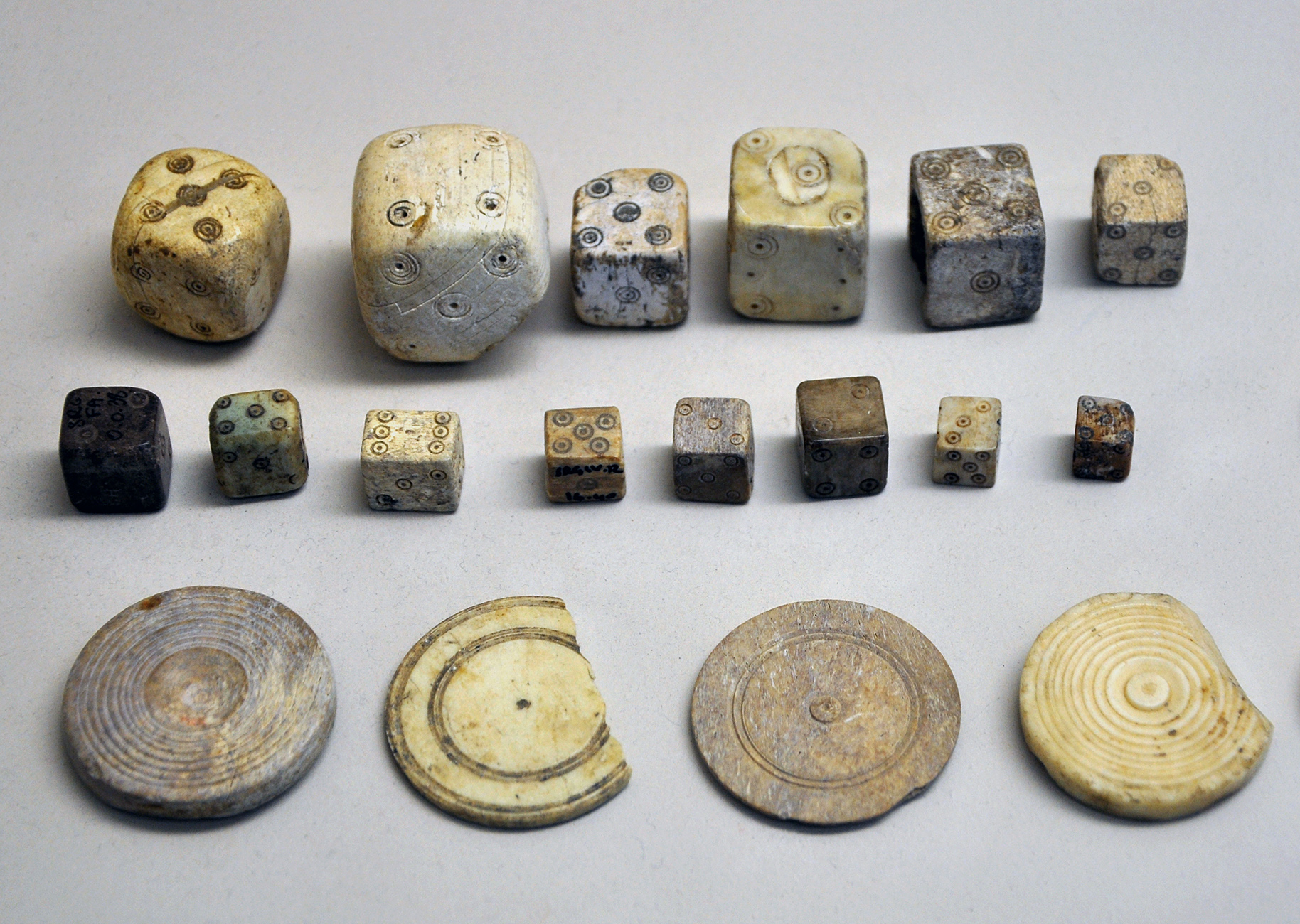 Dés et jetons en os, époque romaine. Musée gallo-romain de Saint-Romain-en-Gal-Vienne.